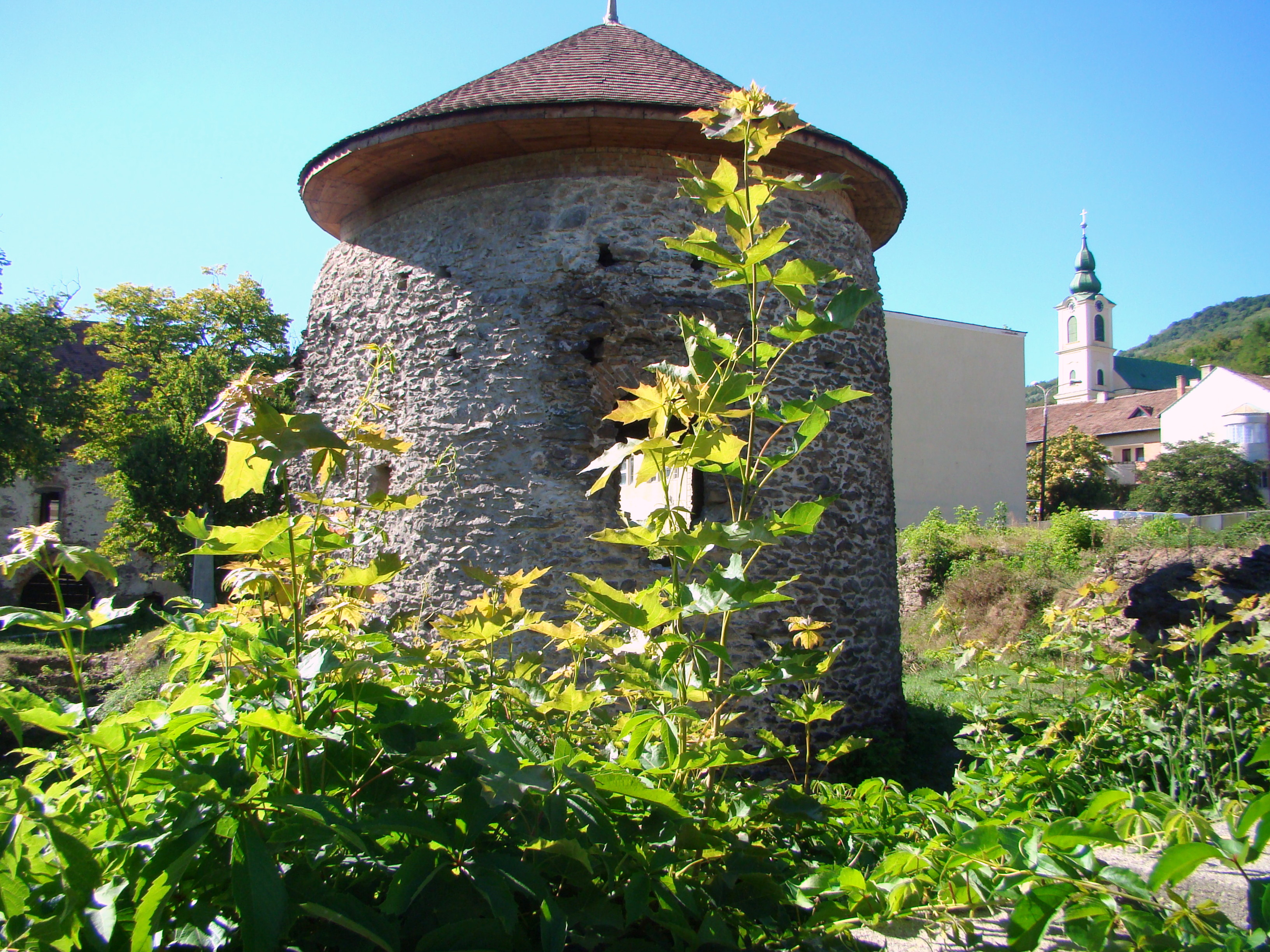 Ansamblul cetății Bathory, oraș Șimleu Silvaniei, Str. Bathory Stefanus 1